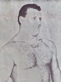 Lou Thesz dans le magazine Olympic Auditorium Wrestling News du 31 janvier 1962.